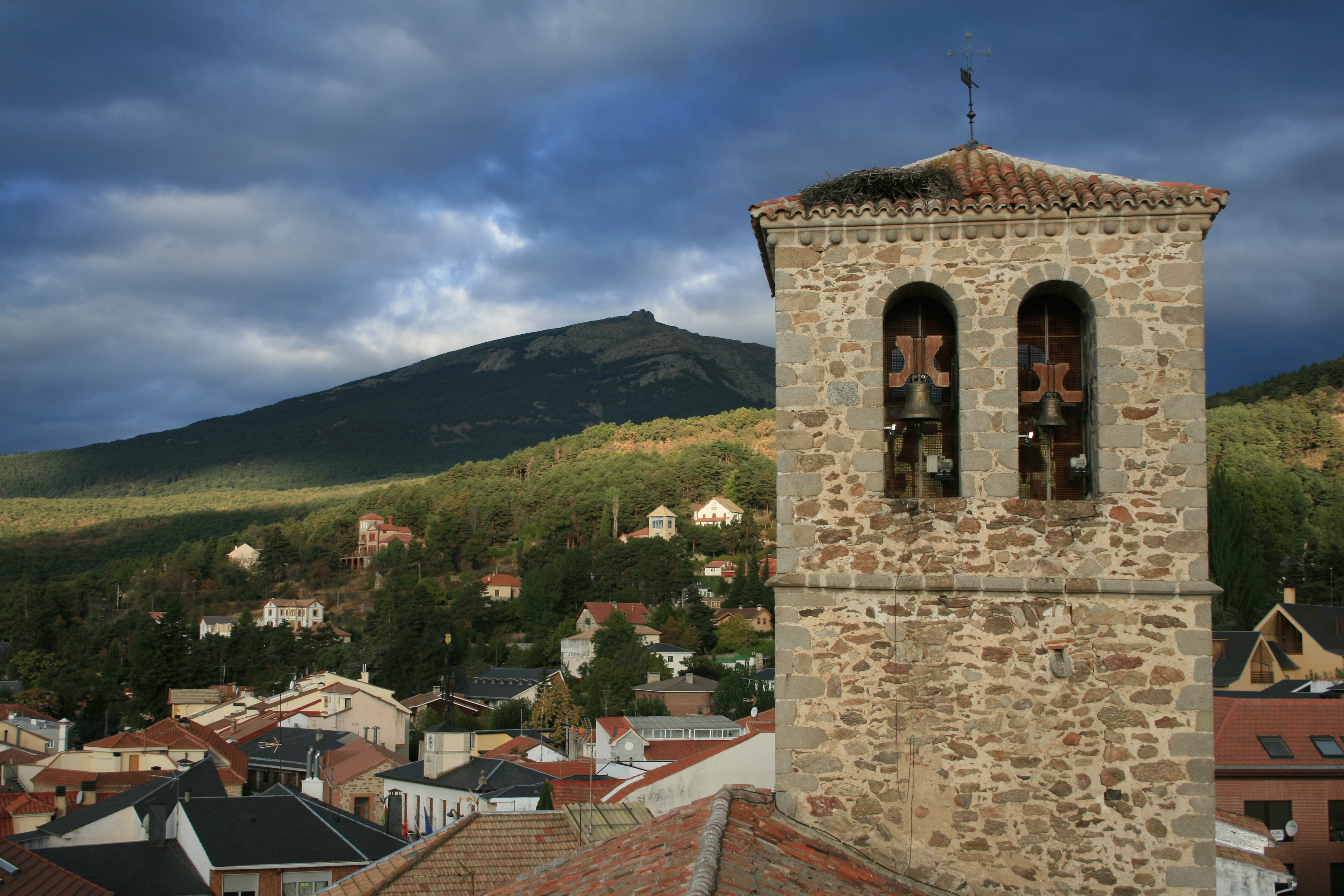 Panorámica de Miraflores de la Sierra